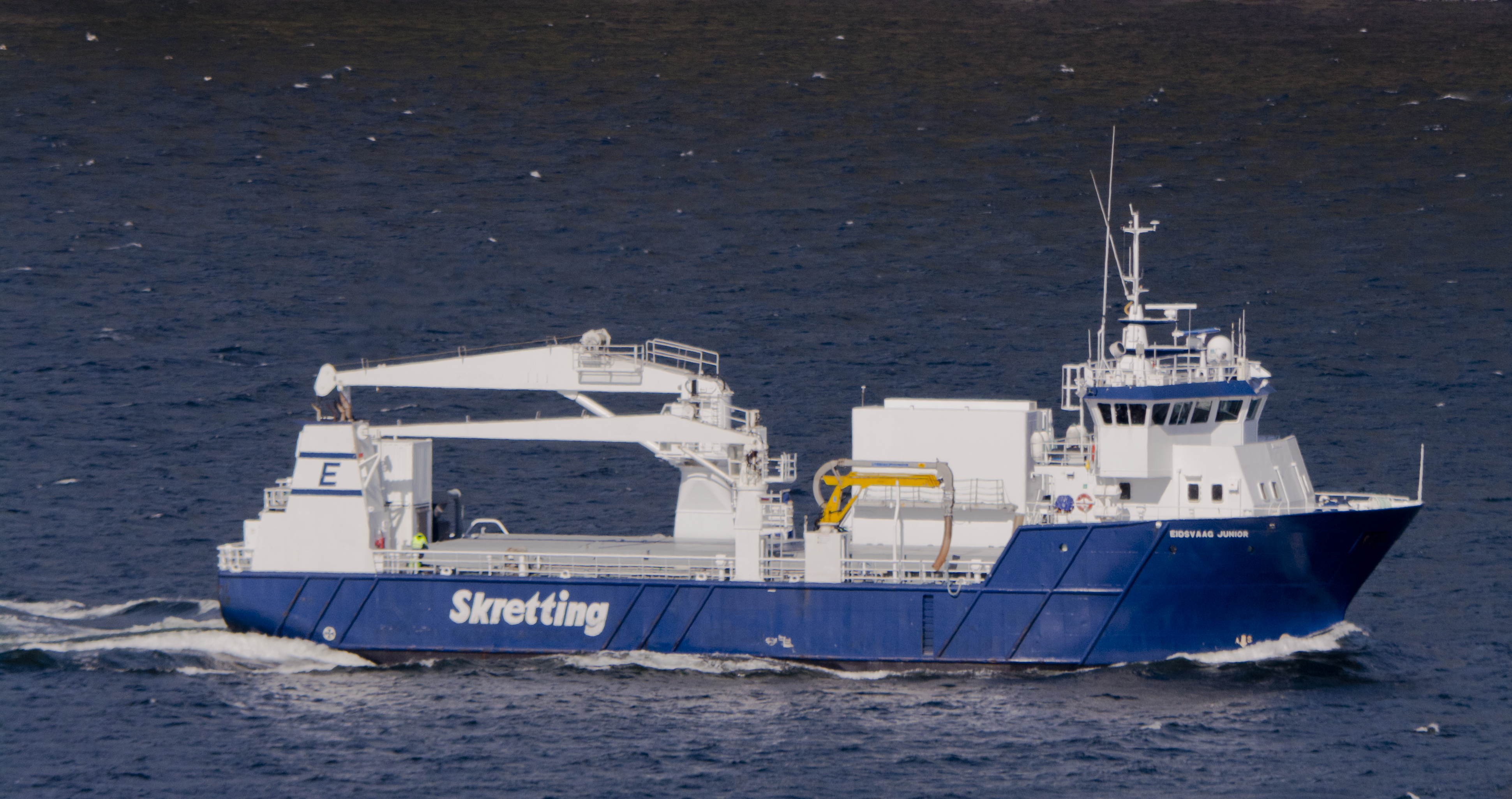 MV Eidsvaag Junior